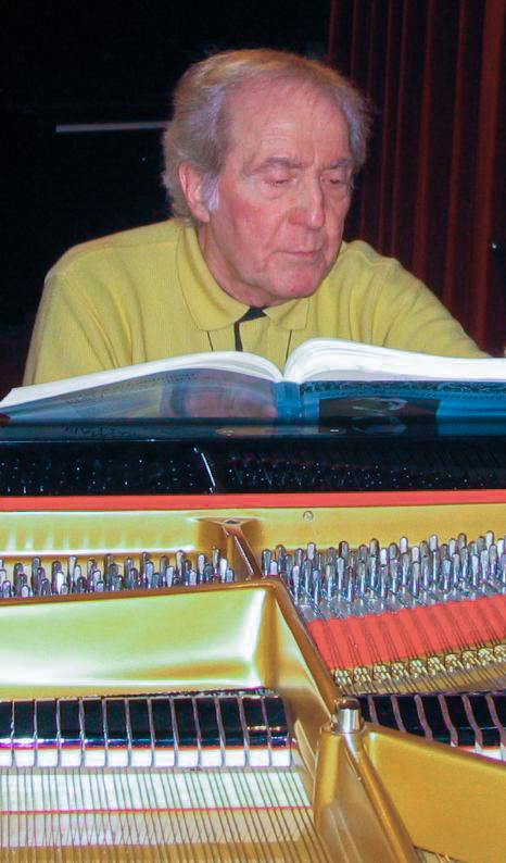 Aldo Ciccolini, italian-french pianist. (dec. 2005) photo:Ziga 08:45, 6 June 2006 (UTC)